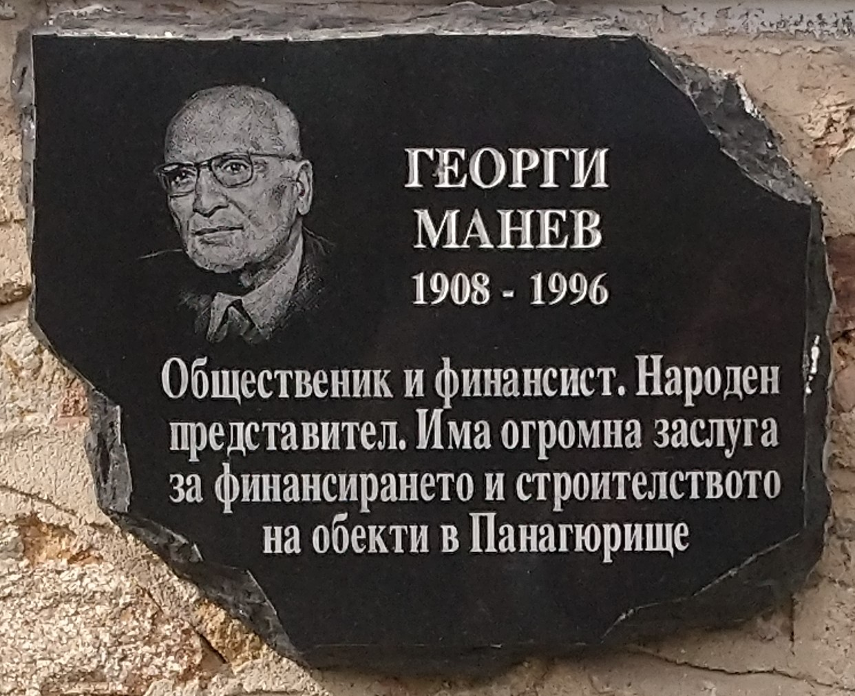 Георги Манев (1908-1996) - плоча в Исторически музей Панагюрище - Надпис: Общественик и финансист. Народен представител. Има огромна заслужа за финансирането и строителството на обекти в Панагюрище.